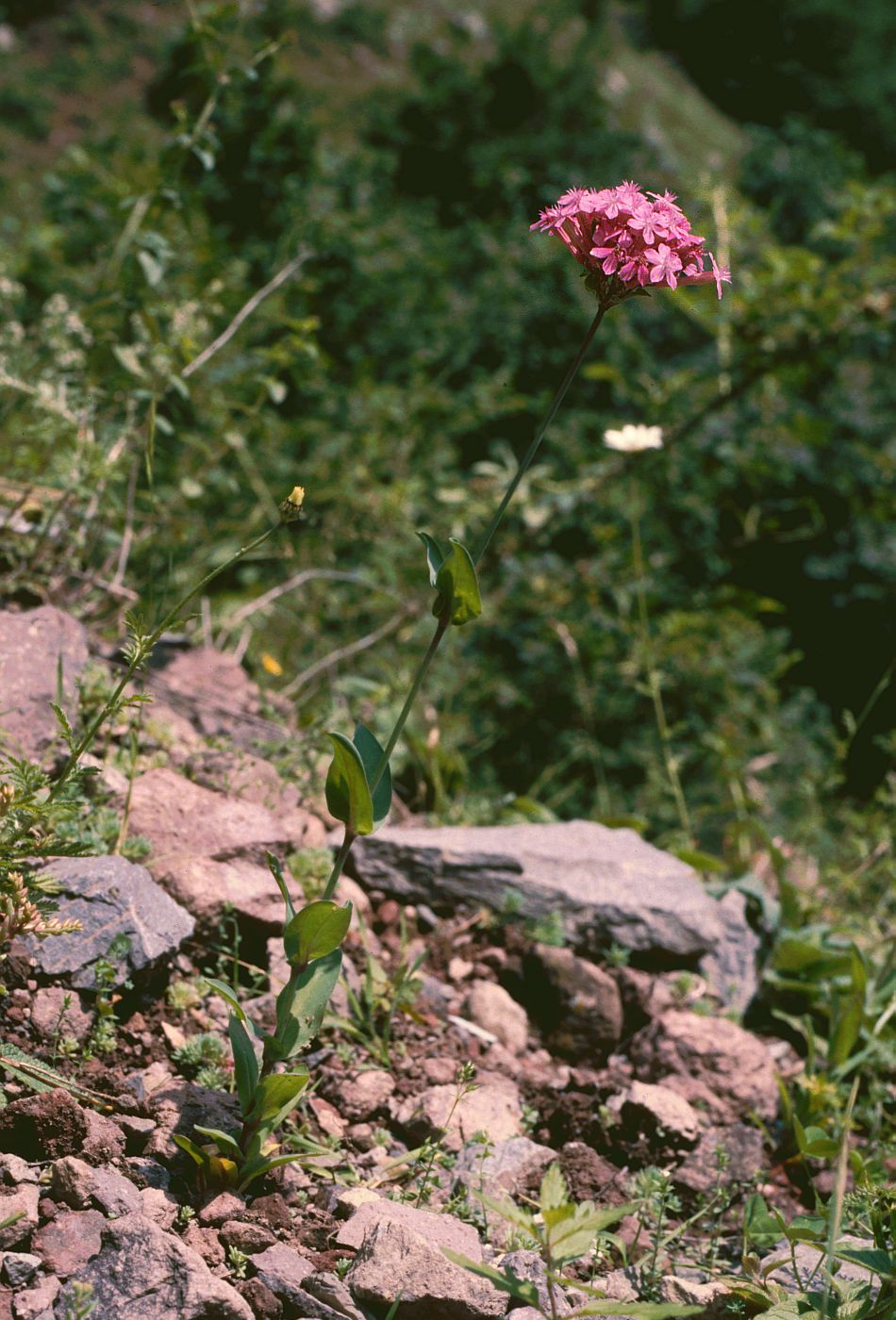 Silene compacta (= Atocion compactum), Nelkengewächse (Caryophyllaceae) - Georgien/საქართველო (Sakartwelo): Großer Kaukasus, Kreuzpass, bei Mleta